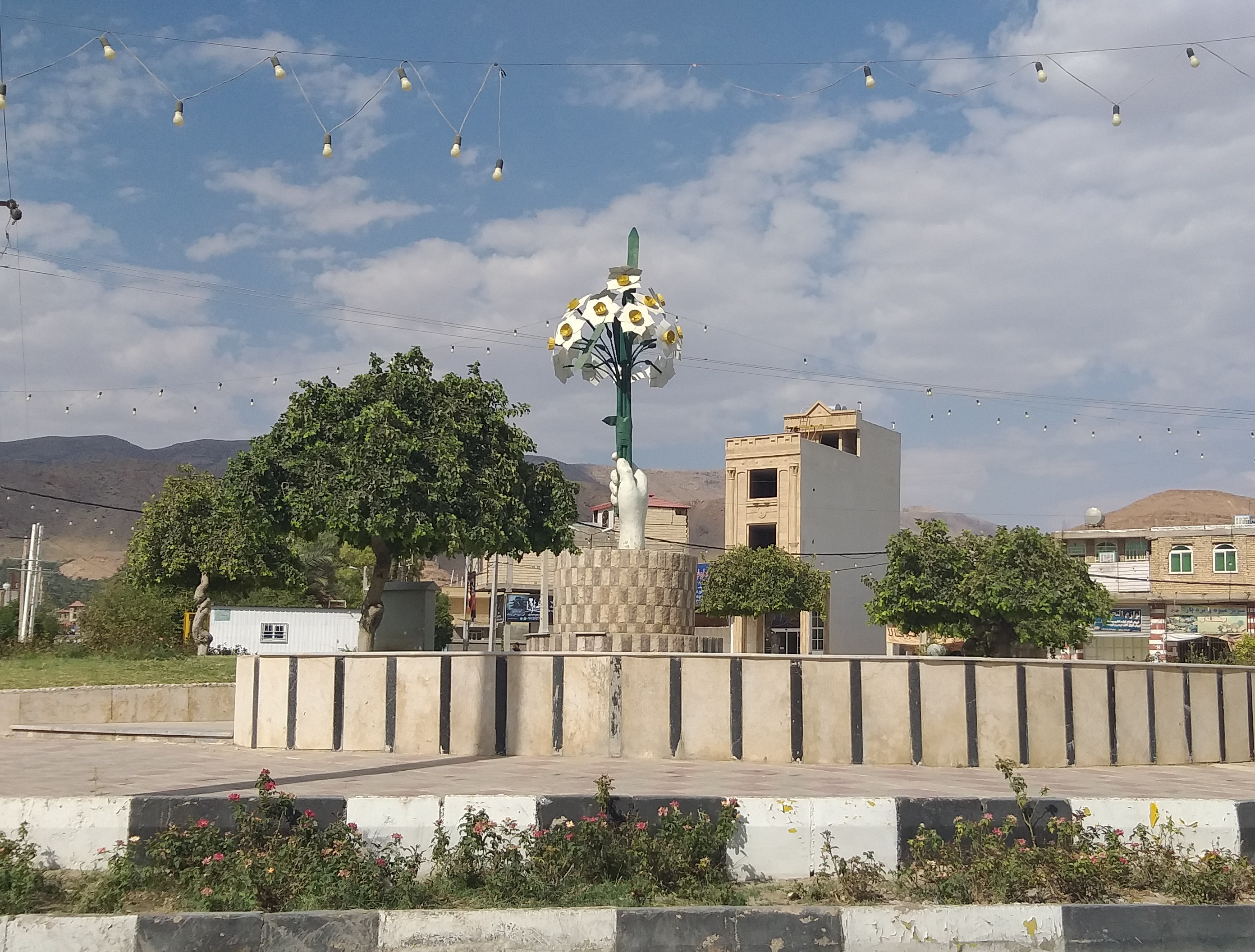 میدان مرکزی باب انار شهرستان خفر